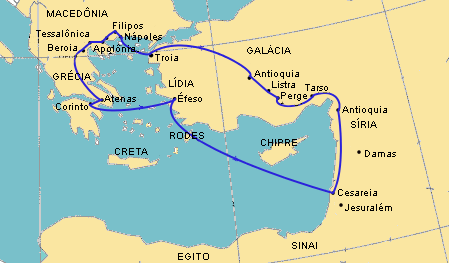 Mapa da 2ª viagem de Paulo